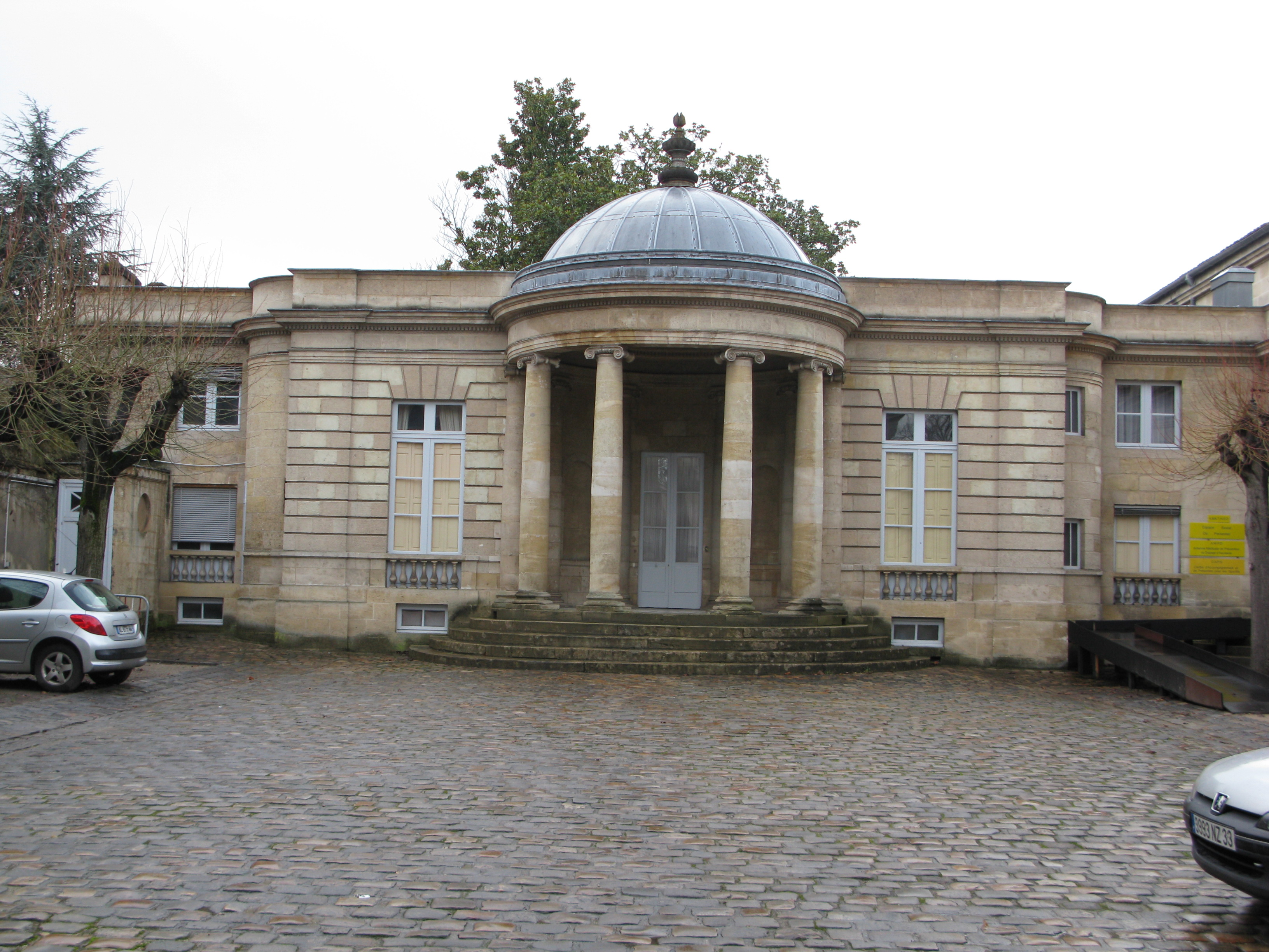 Hôtel Saint-Marc de Bordeaux, 91 cours d'Albret